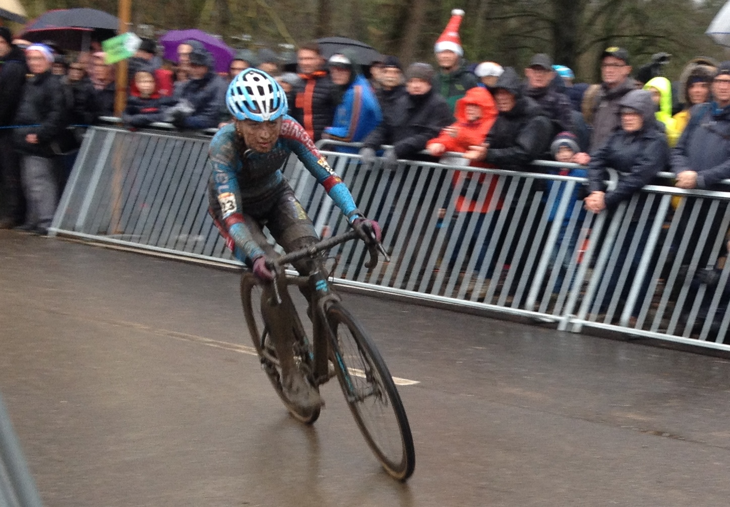 Denise Betsema 7e in Wereldbeker veldrijden op de Citadel van Namen op zondag 23 december 2018